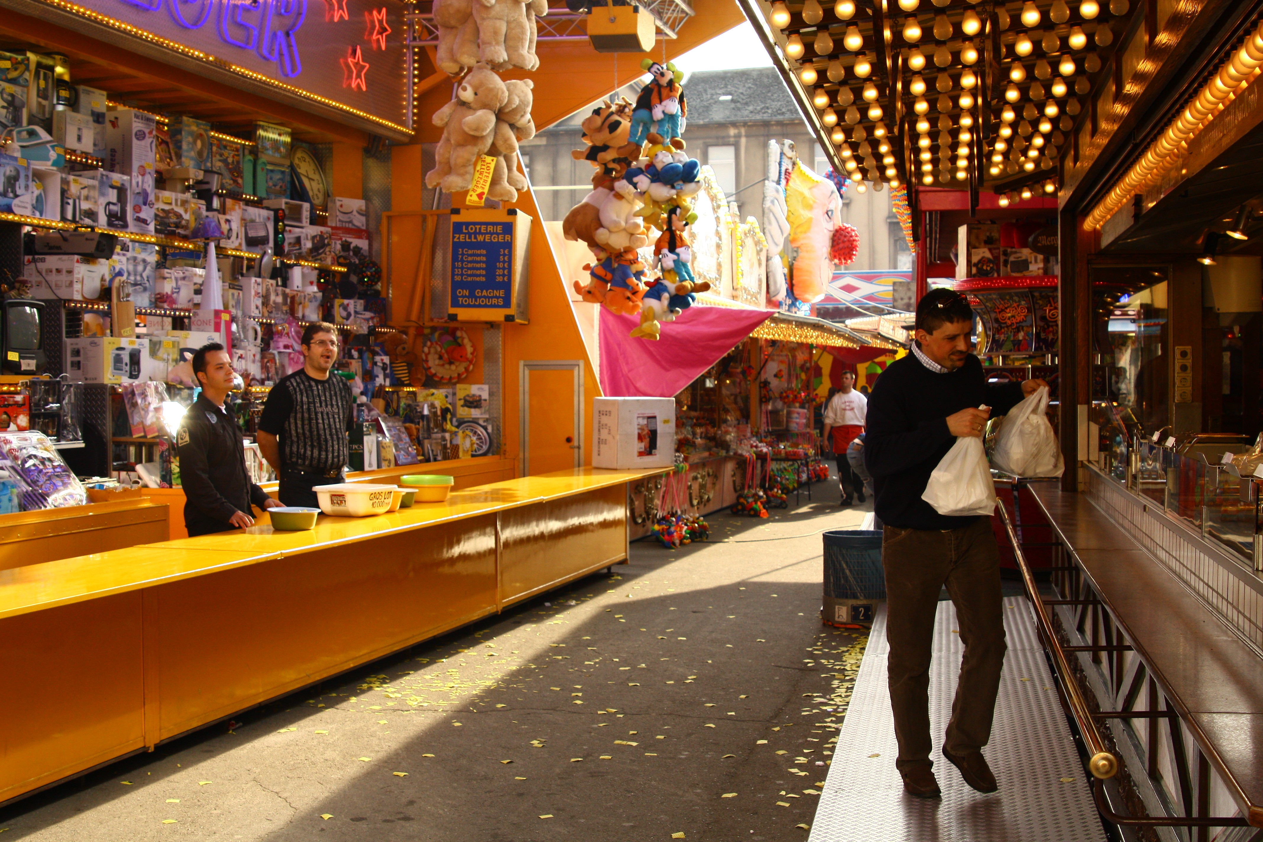 Kiermesstänn.